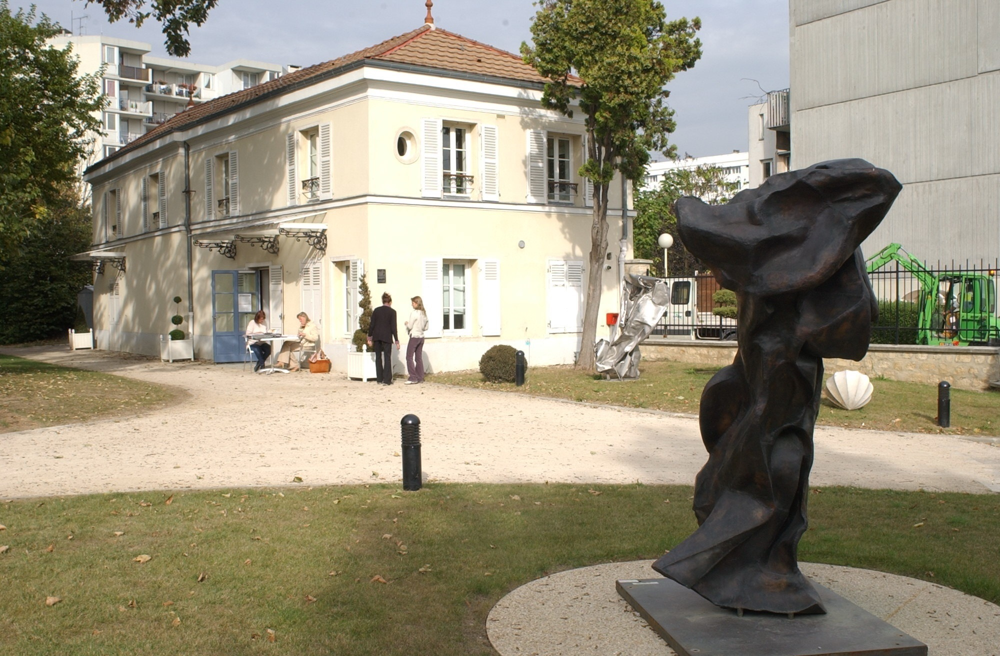 Maison des arts de Bagneux (Hauts-de-Seine), ancienne demeure du docteur vétérinaire Henri Drieux, professeur à l'école nationale vétérinaire d'Alfort. Une plaque à son nom, a été apposée sur l'angle de la maison ( au dessus de la personne en noir sur la photo) par l’Oeuvre d'assistance aux animaux d'abattoir. Publiée avec l'aimable autorisation de la ville de Bagneux.